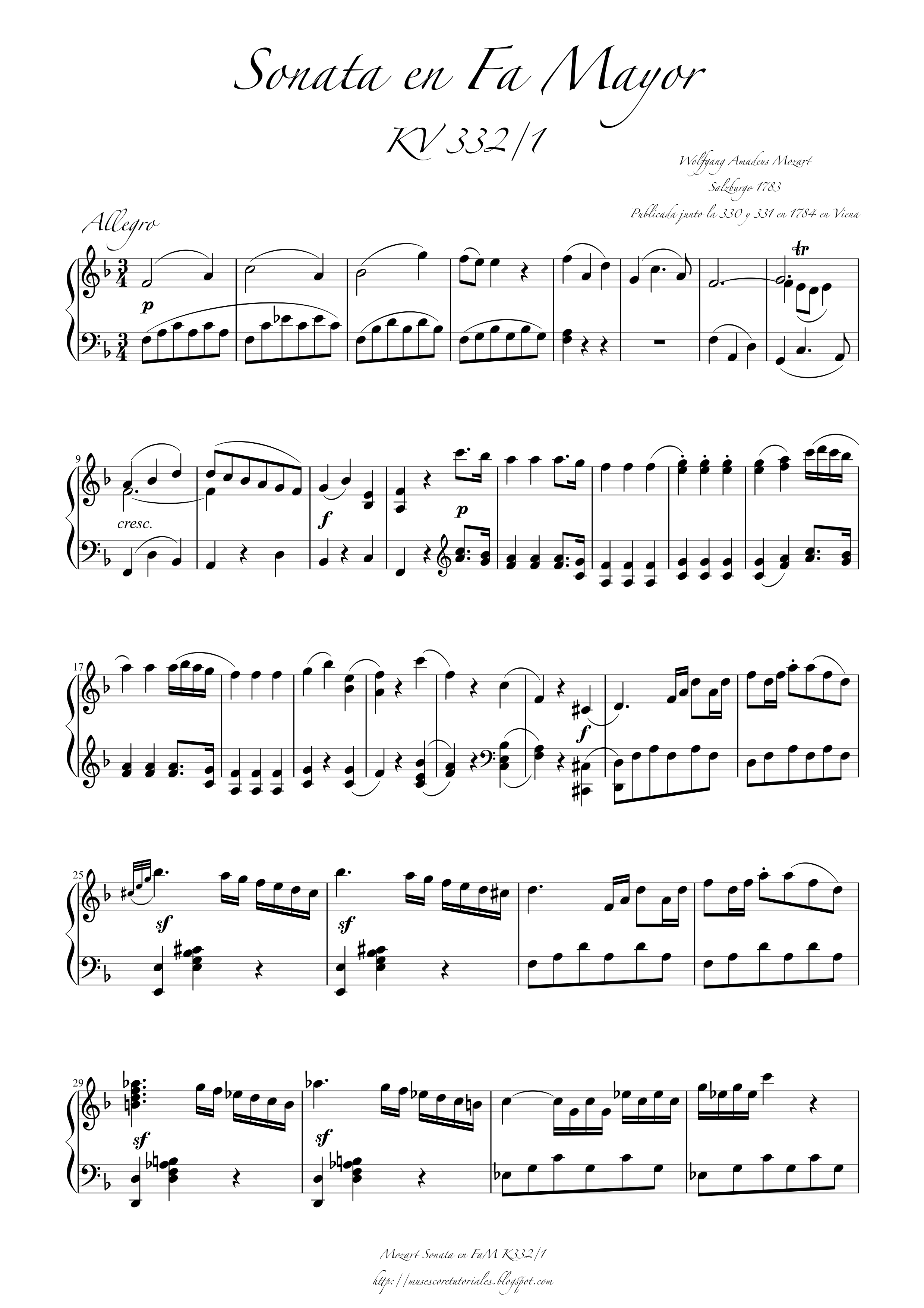 Sonata para piano KV332 de Wolfgang Amadeus Mozart. Editada con MuseScore